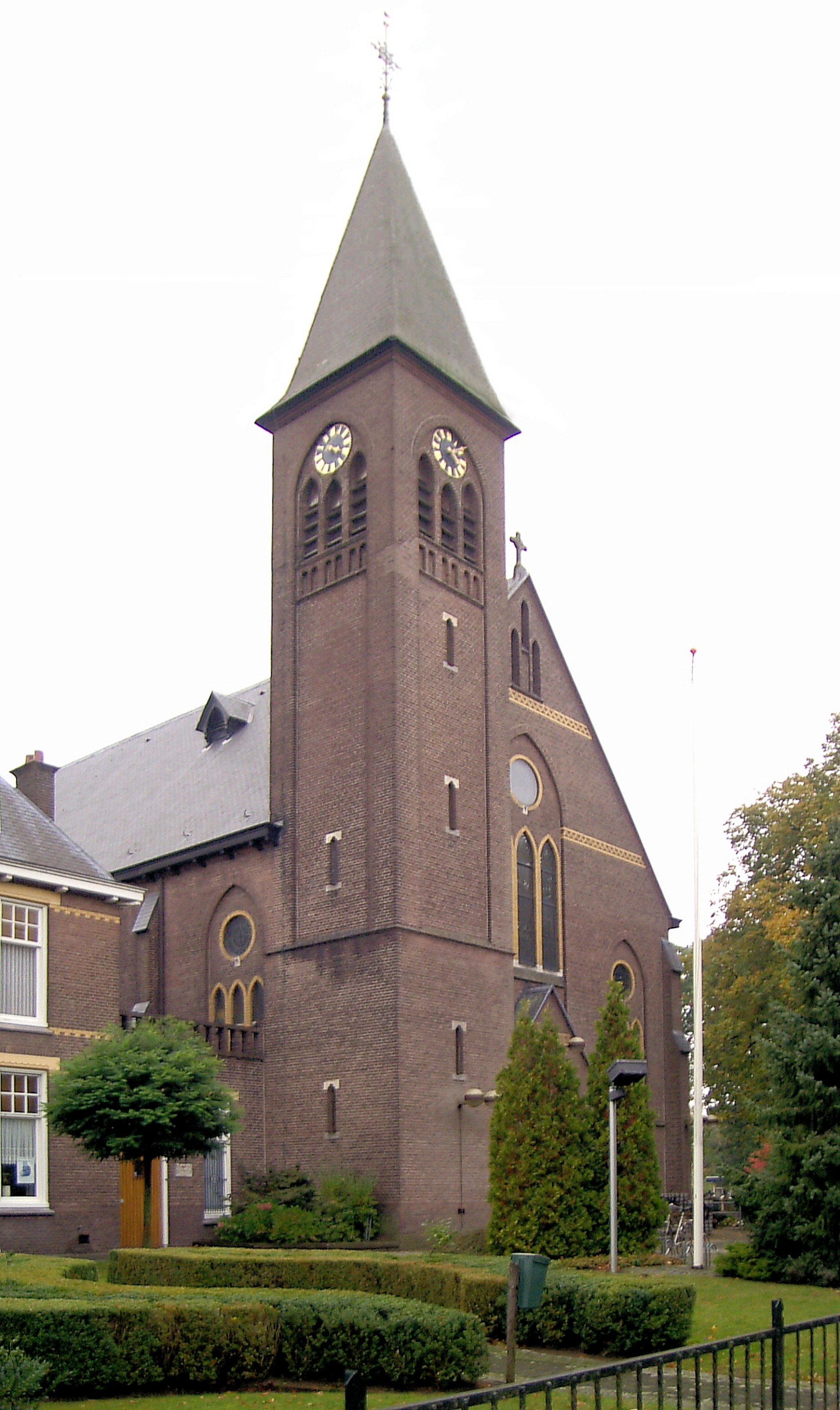 Roomskatholieke kerk van Overdinkel